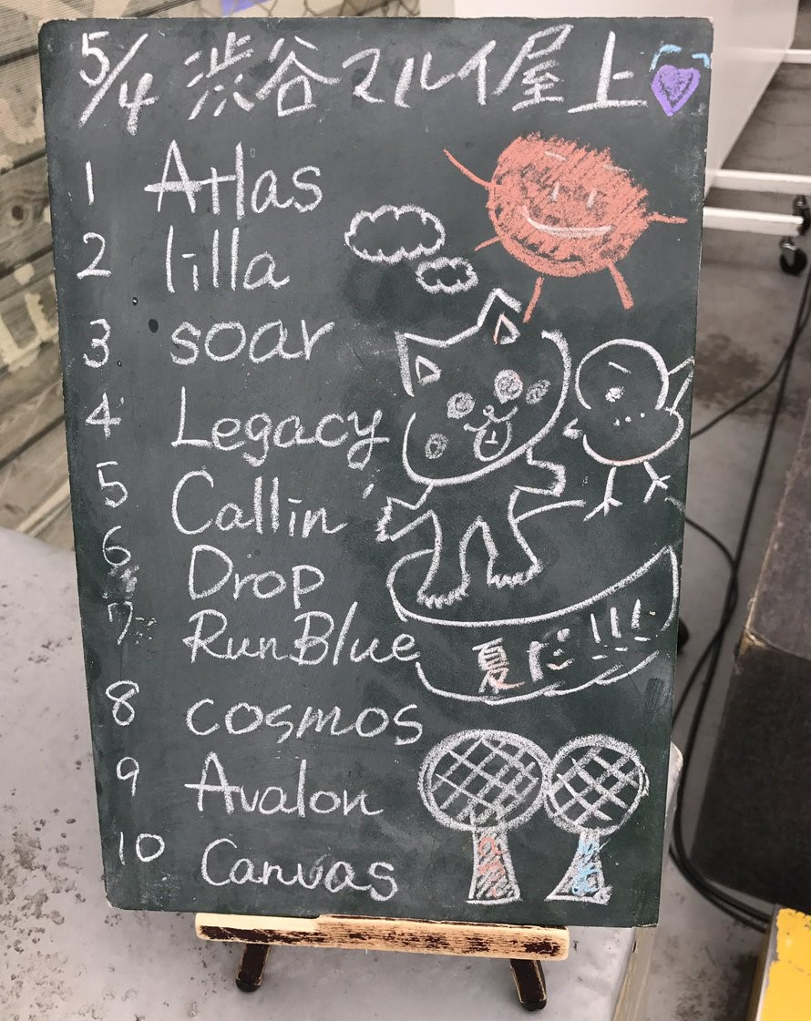 amiinAセトリボード(20170604(1))